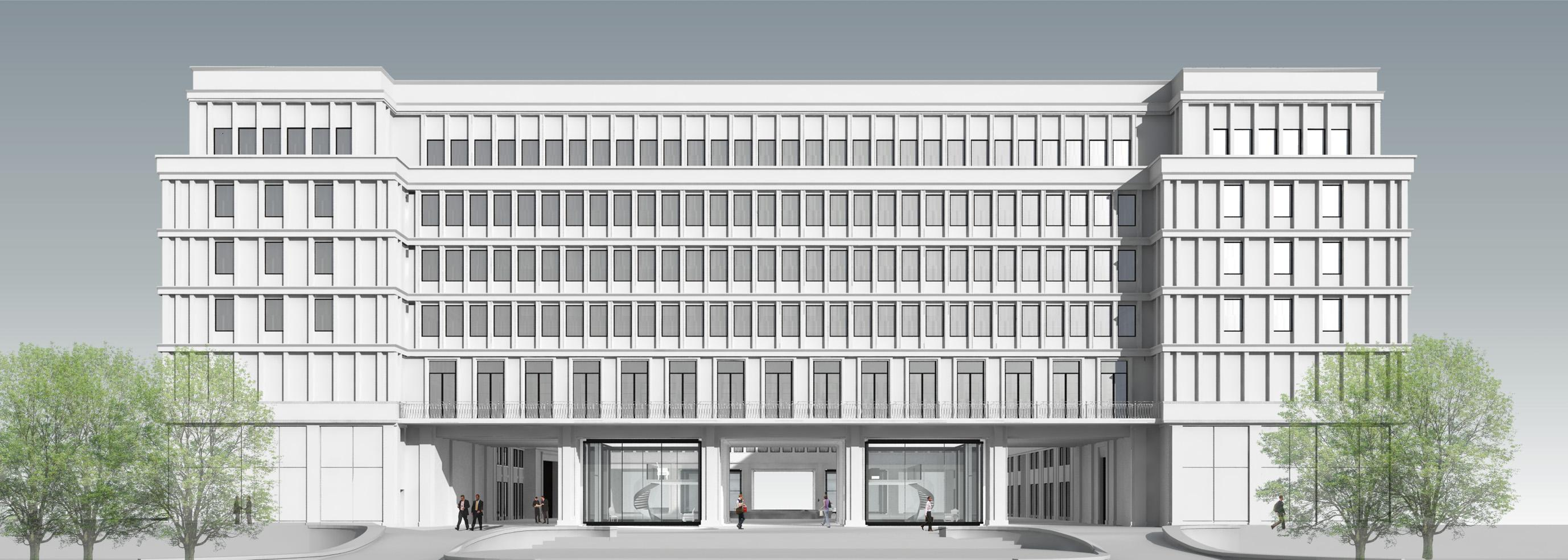 Rozbudowa i przebudowa Domu Partii przy ulicy Nowy Świat w Warszawie